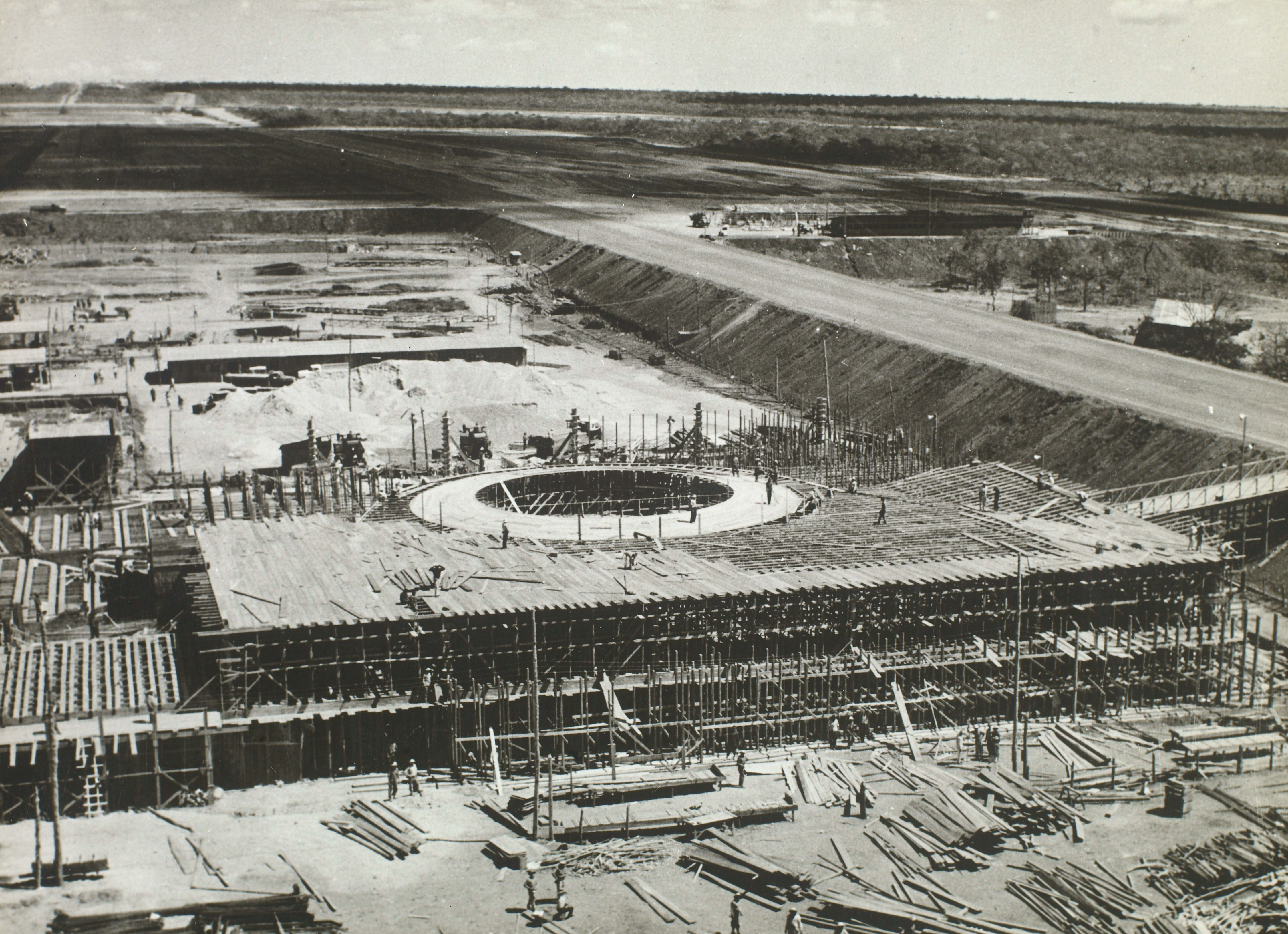 Fotografia do Fundo Correio da Manhã, sob a guarda do Arquivo Nacional.